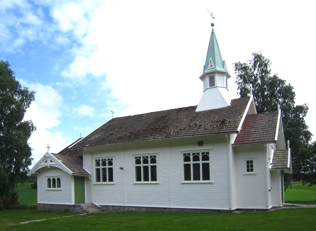 Holleby kirke (Sarpsborg kommune)